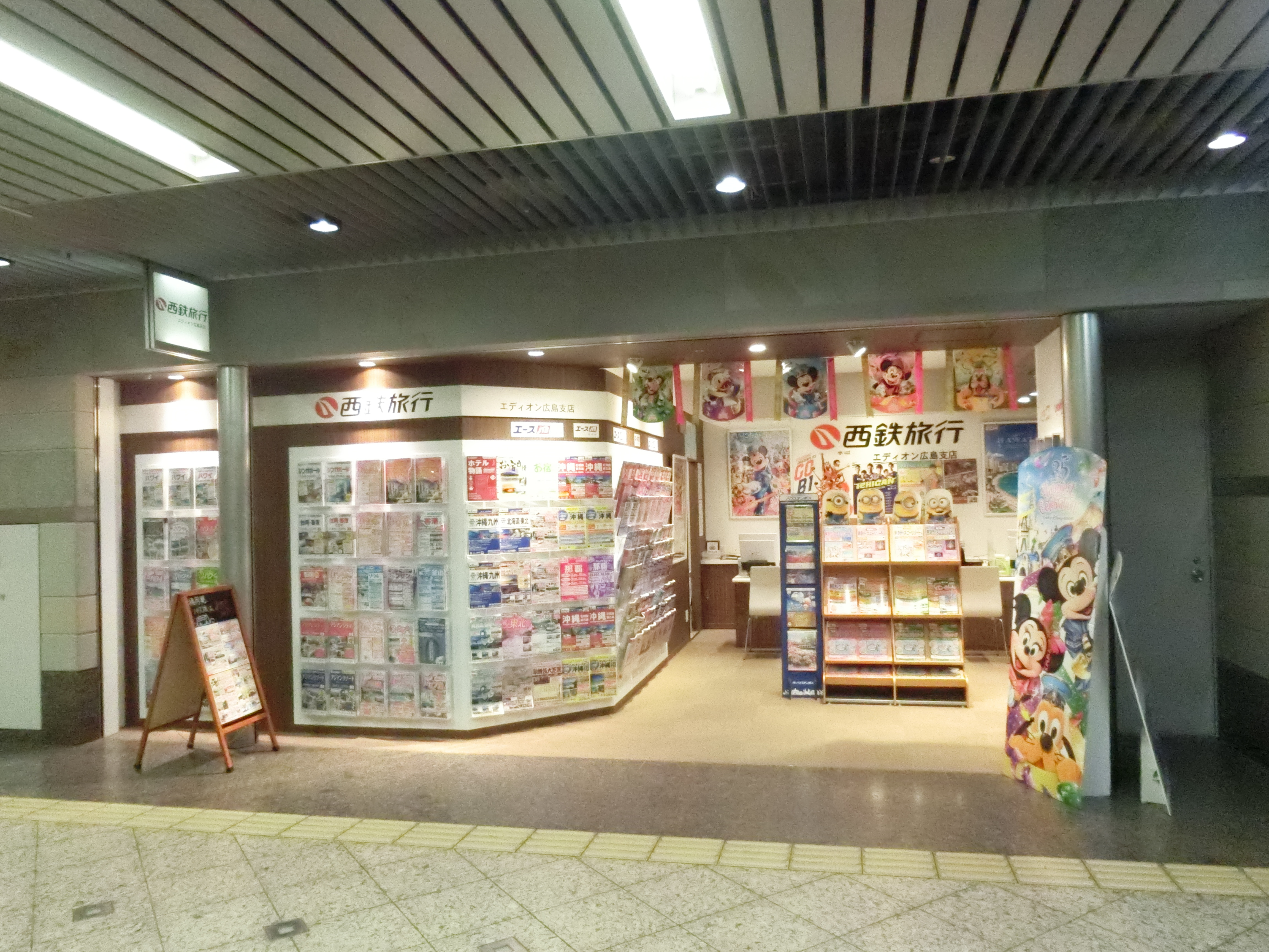 広島市中区の紙屋町シャレオ内にある西鉄旅行のエディオン広島支店の仮店舗。